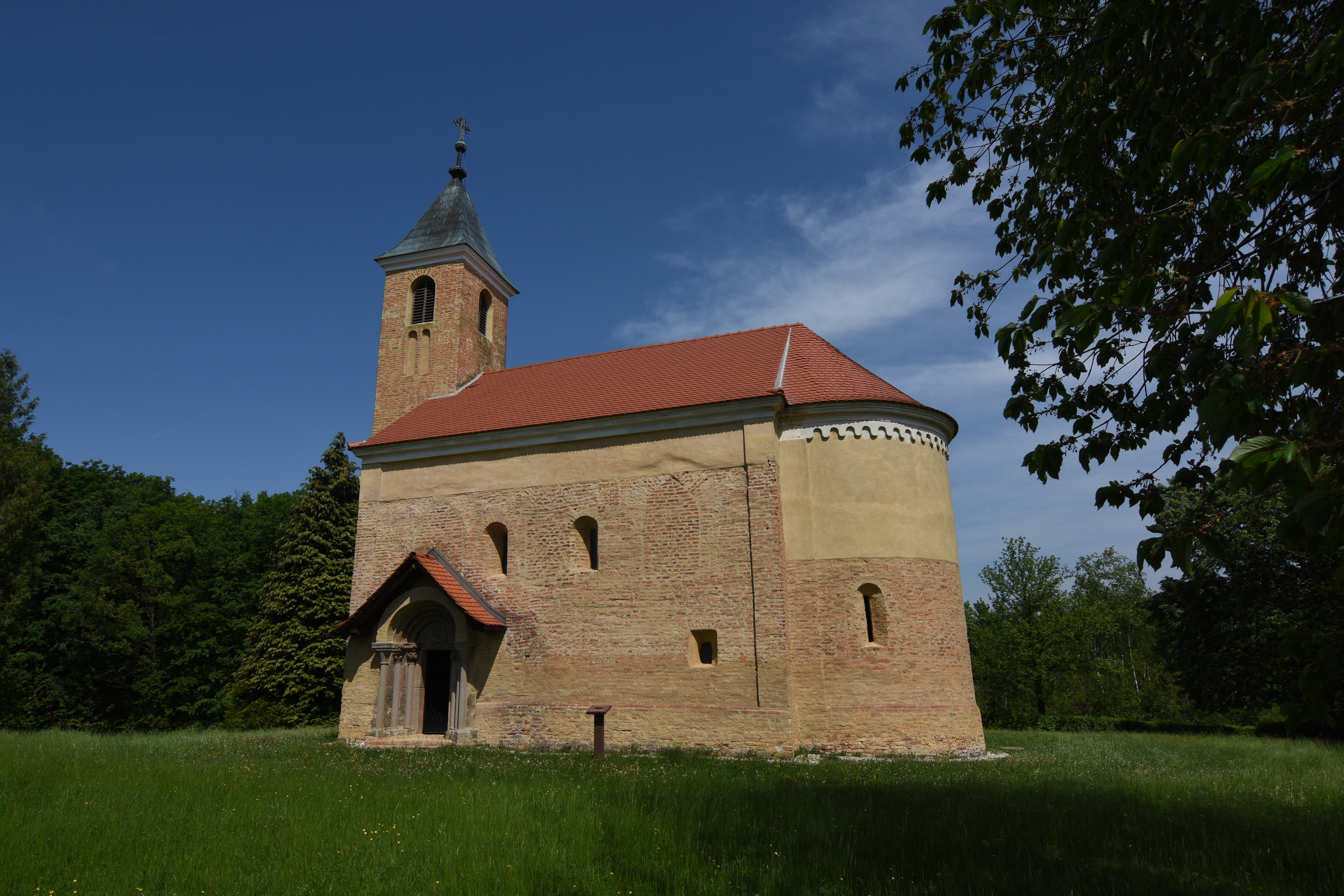 Domanjševci Kirche